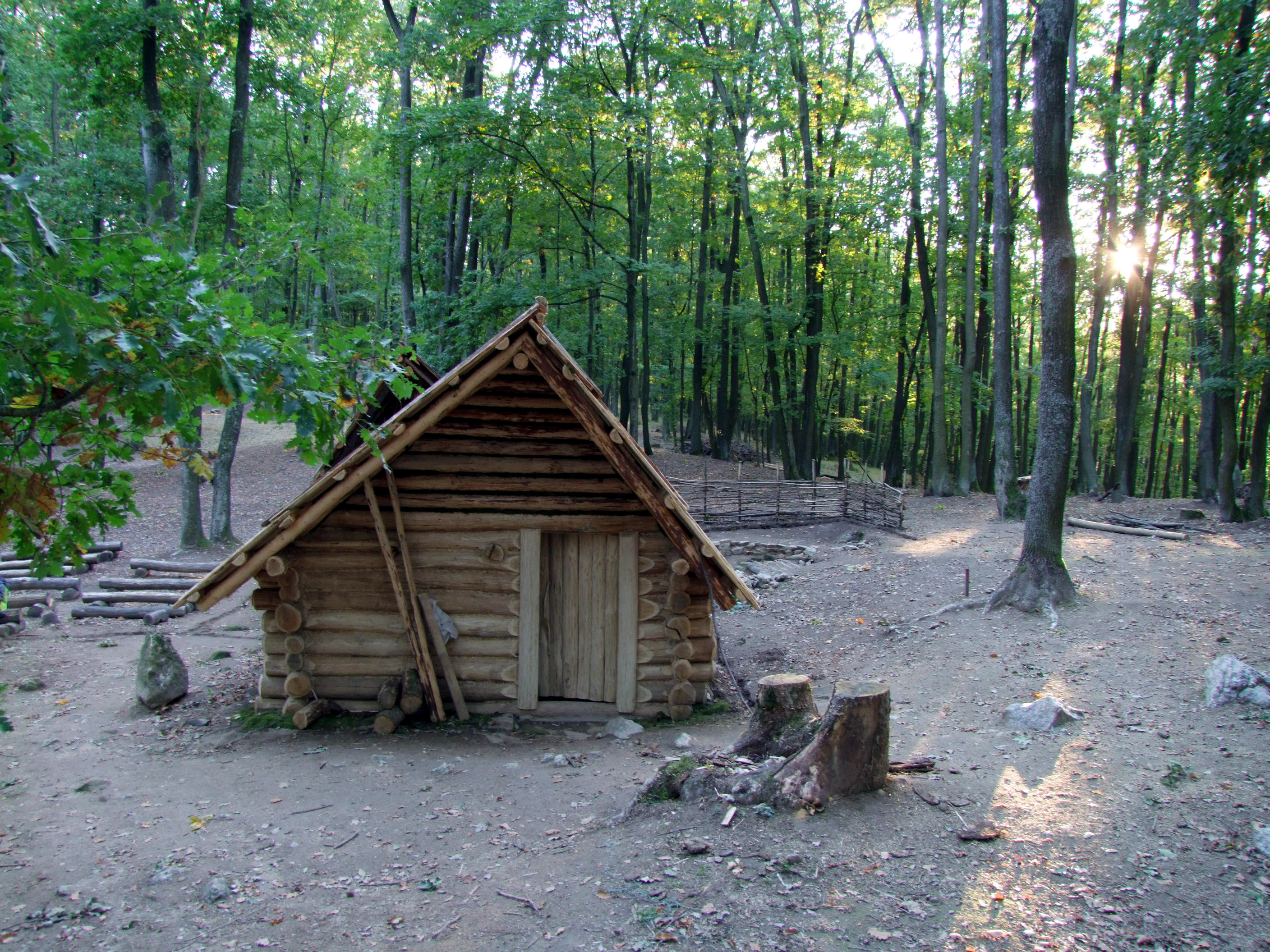 Archeologická lokalita Hradiska v Bojnej